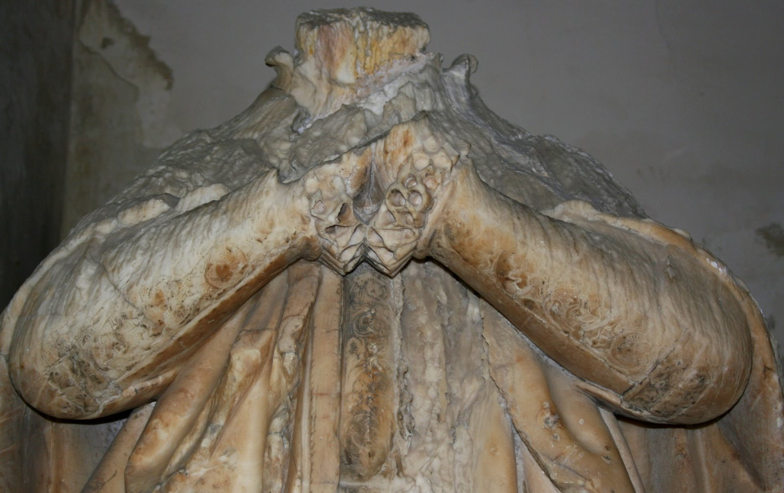 Juan de Porres y Mateo González: estatua orante del embajador Hans Khevenhüller, fallecido en Madrid en 1606. Destruida durante la Guerra de la Independencia. Madrid, Iglesia de San Jerónimo el Real